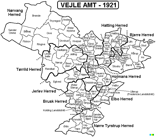 Kort over Vejle Amt 1921, Denmark Source: Map by Svend-Erik Christiansen